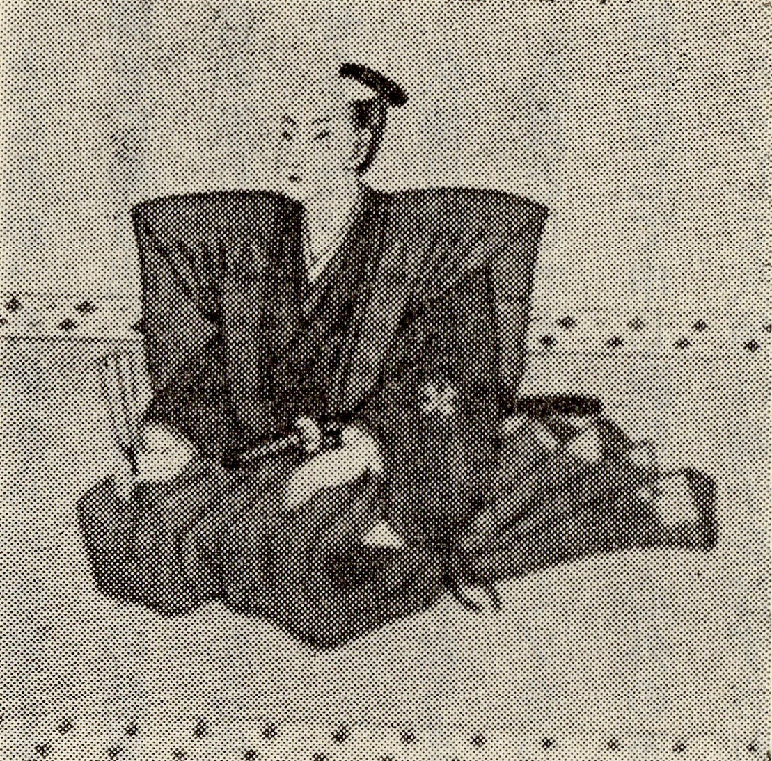 中川久持の肖像(モノクロ)。